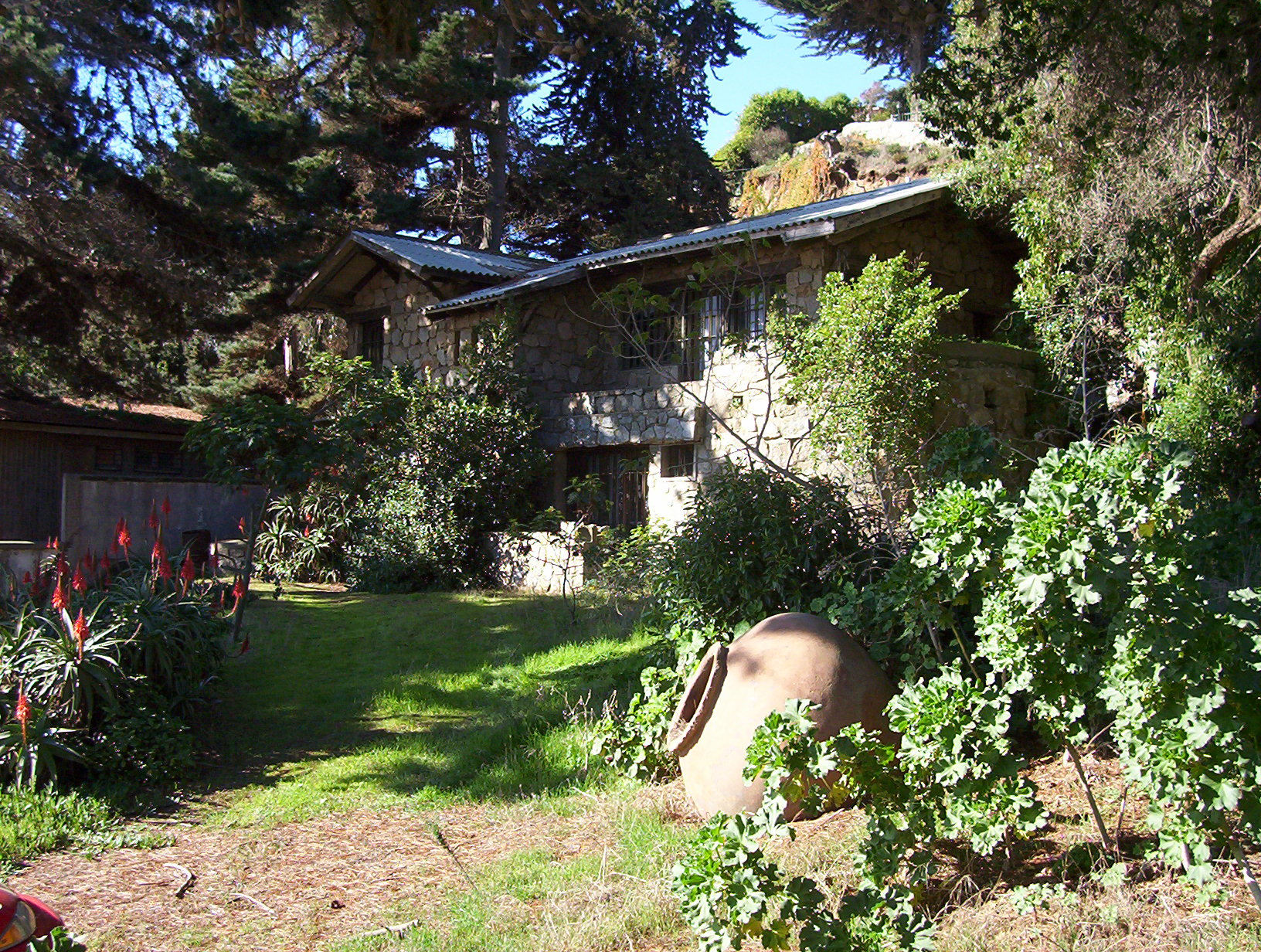 Casa de Isidoro Dubornais